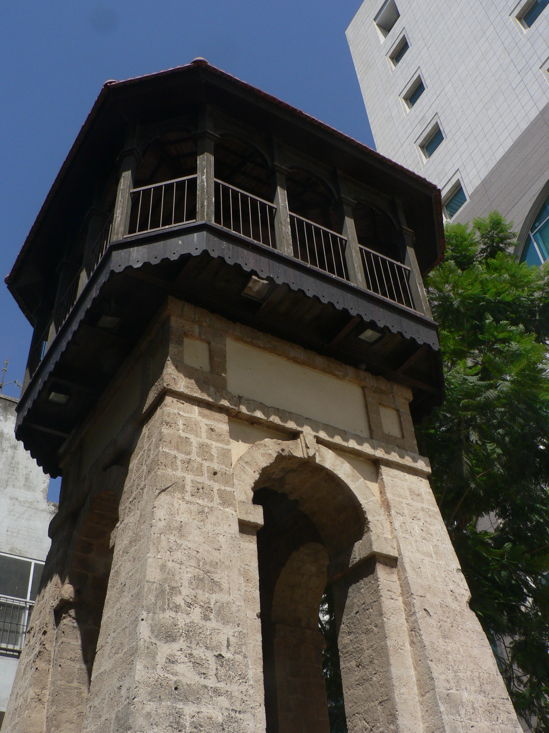 Rishon LeZion old water tower, Israel מגדל המים העתיק של ראשון לציון, ישראל